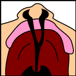 Unilateral complete cleft lip (left side).